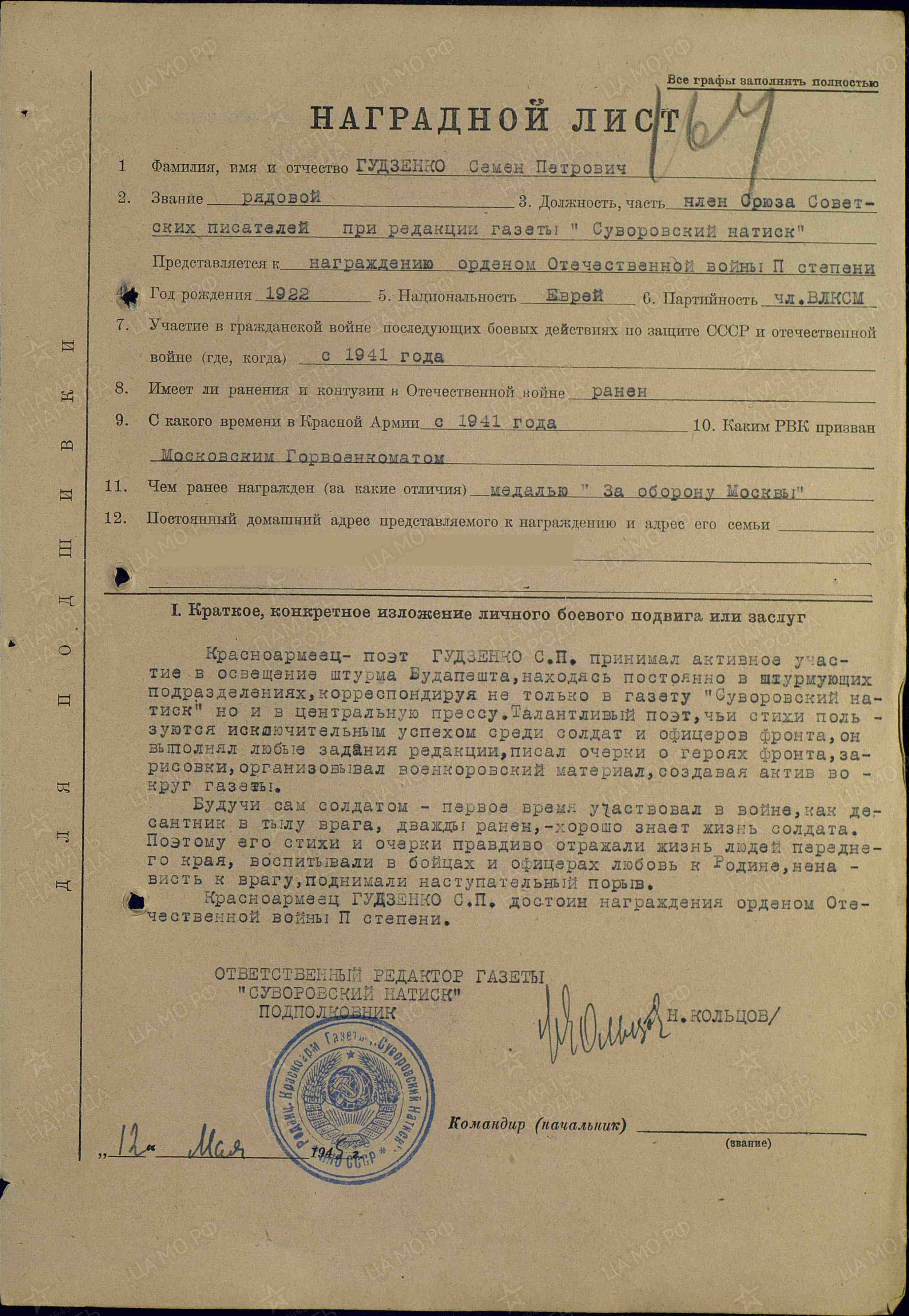 Гудзенко Семён Петрович – Наградной Лист – Орден Красной Звезды – 1945. (На второй странице листа в итоге было решено наградить Орденом Красной Звезды)